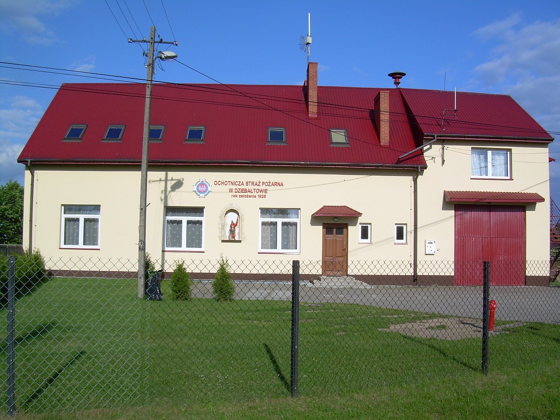 Strażnica OSP Dziebałtów, zdjęcie powstało 2012-06-02